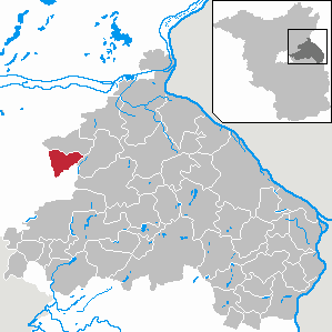 Beiersdorf-Freudenberg in Brandenburg (Country) - District Märkisch-Oderland